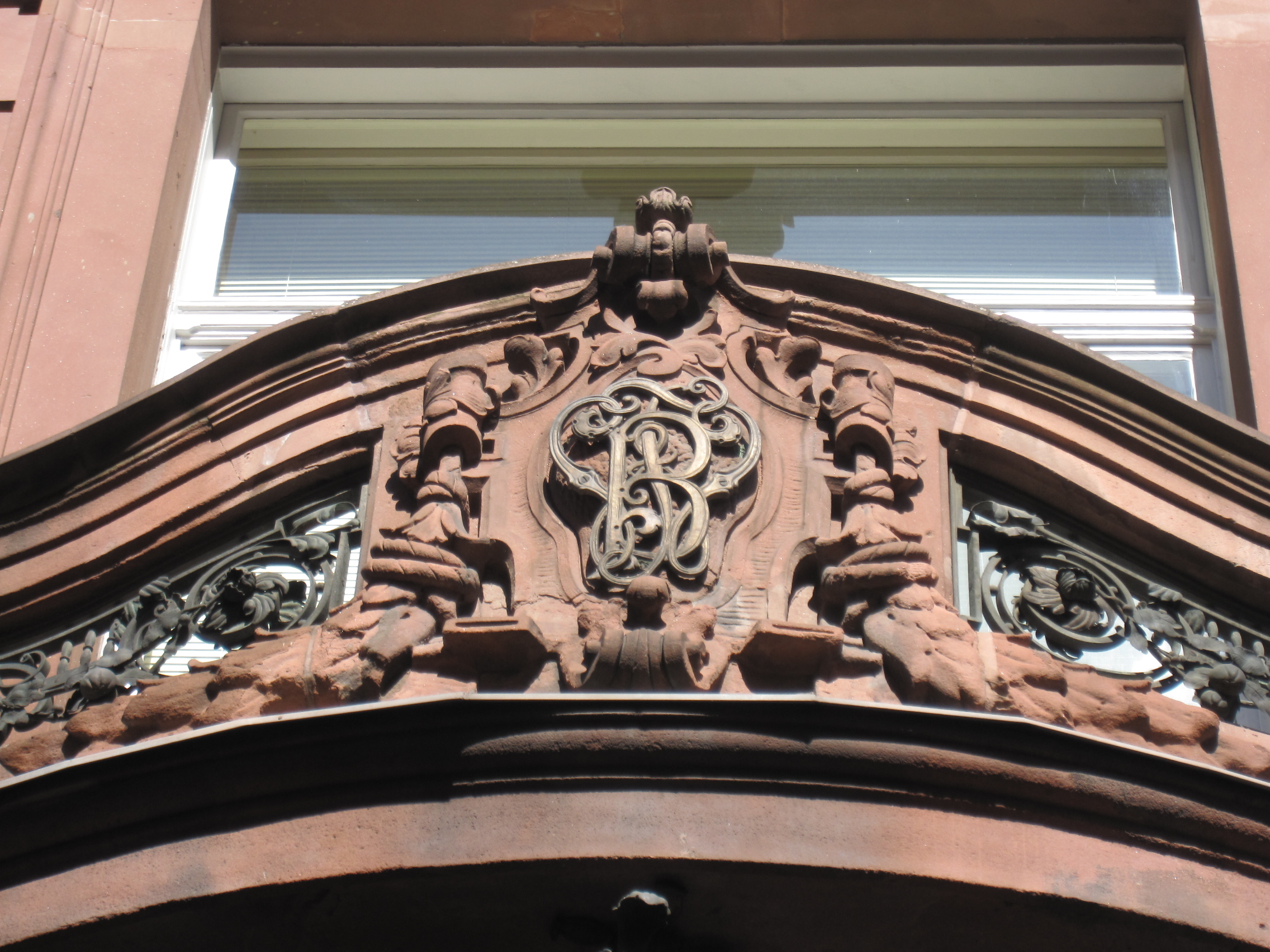 F. W. Borchardt in Berlin